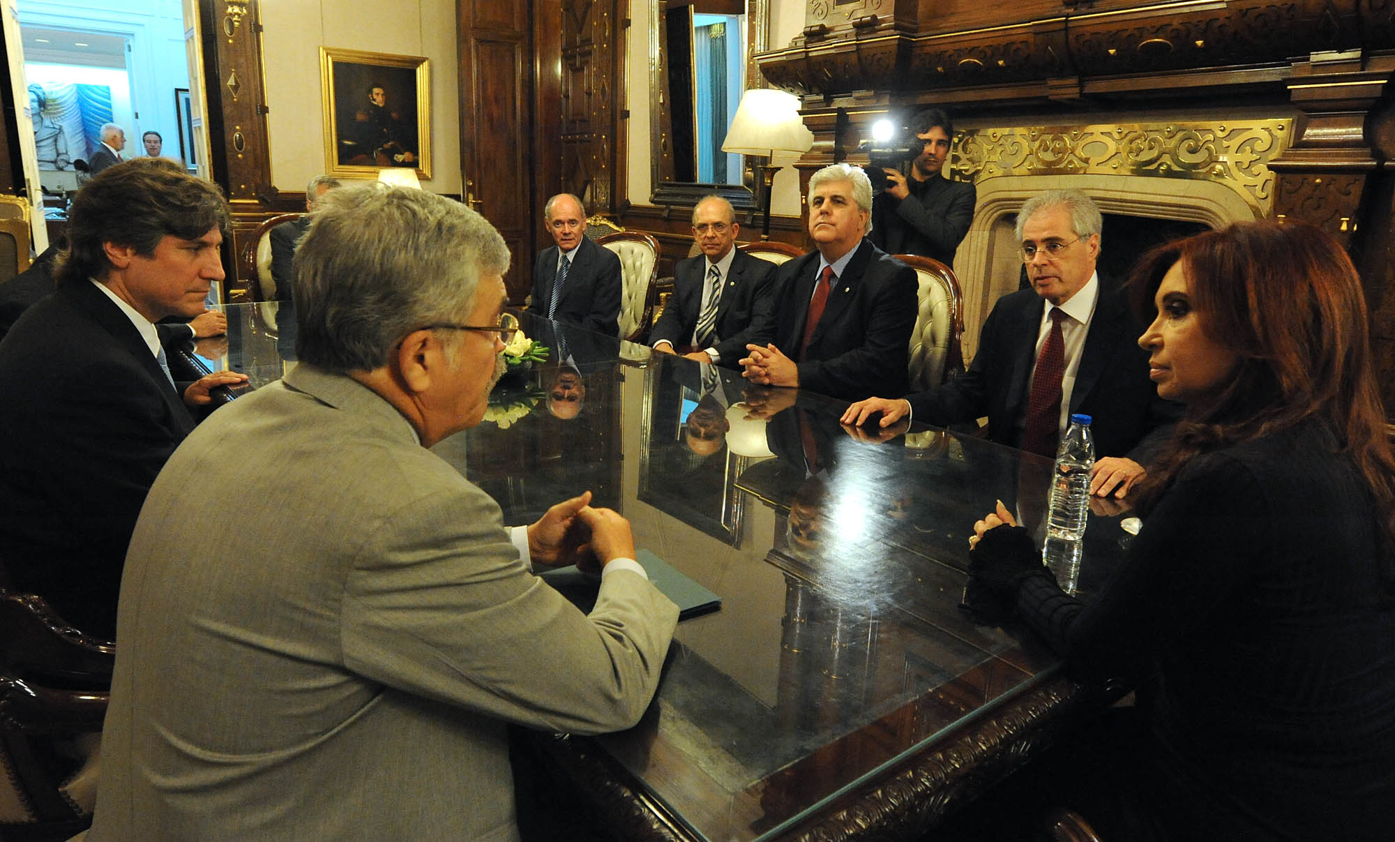 La presidenta Cristina Fernández en su despacho de Casa Rosada, junto al vicepresidente Amado Boudou; el ministro de Planificación Federal, Julio De Vido; el secretario de Energía, Daniel Cámeron; el presidente de la Comisión Técnica Mixta (CTM), Oscar Thomas; el presidente de Ebisa y miembro de la CTM, Edgardo Raúl Lluravel; el coordinador del proyecto Garabí y Panambí, Daniel Perczyk; el embajador de Brasil en Buenos Aires, Enio Cordeiro; el secretario de planeamiento energético CTM, Altino Ventura; el director de Generación de Electrobras, Valter Cardeal de Souza, el miembro por brasil de la CTM, Sidney Do Lago.